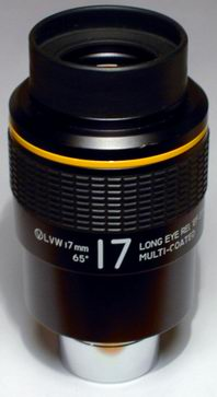 17mm Vixen LVW eyepiece Oculaire Vixen LVW de 17 mm